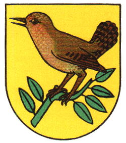 Wappen von Villars Bourquin Kanton Waadt